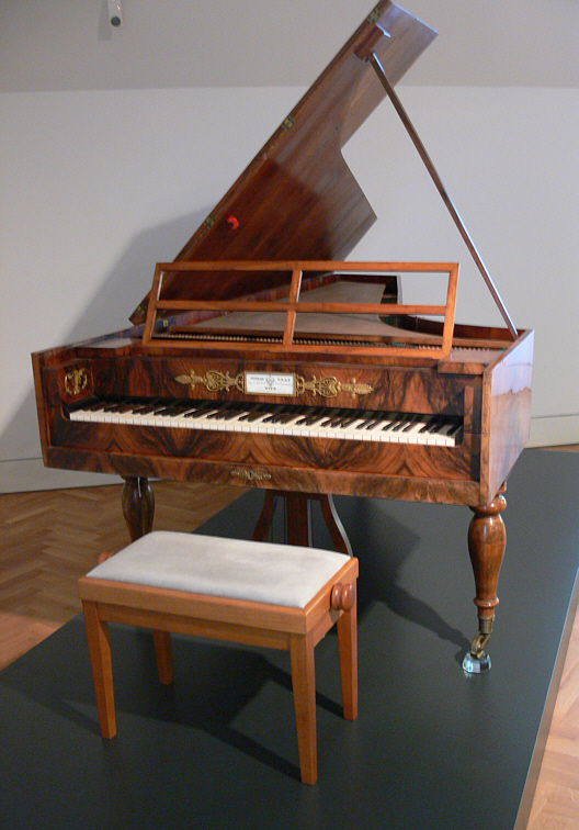 Hammerflügel von Conrad Graf (1782–1851). Reiss-Engelhorn-Museen, Mannheim